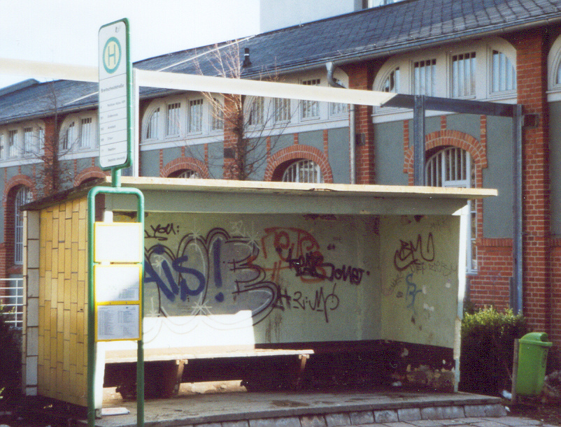 Ein DDR-Buswartehäuschen in der Rudolf-Breitscheid-Straße in Ilmenau.